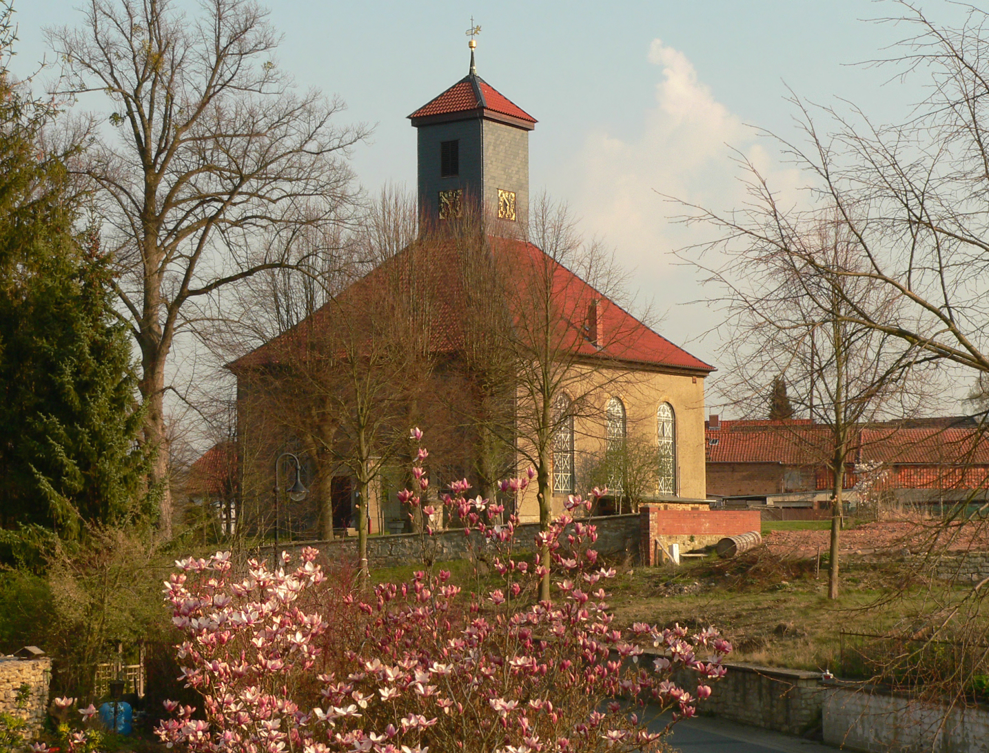 St.-Stephani-Kirche (Räbke)